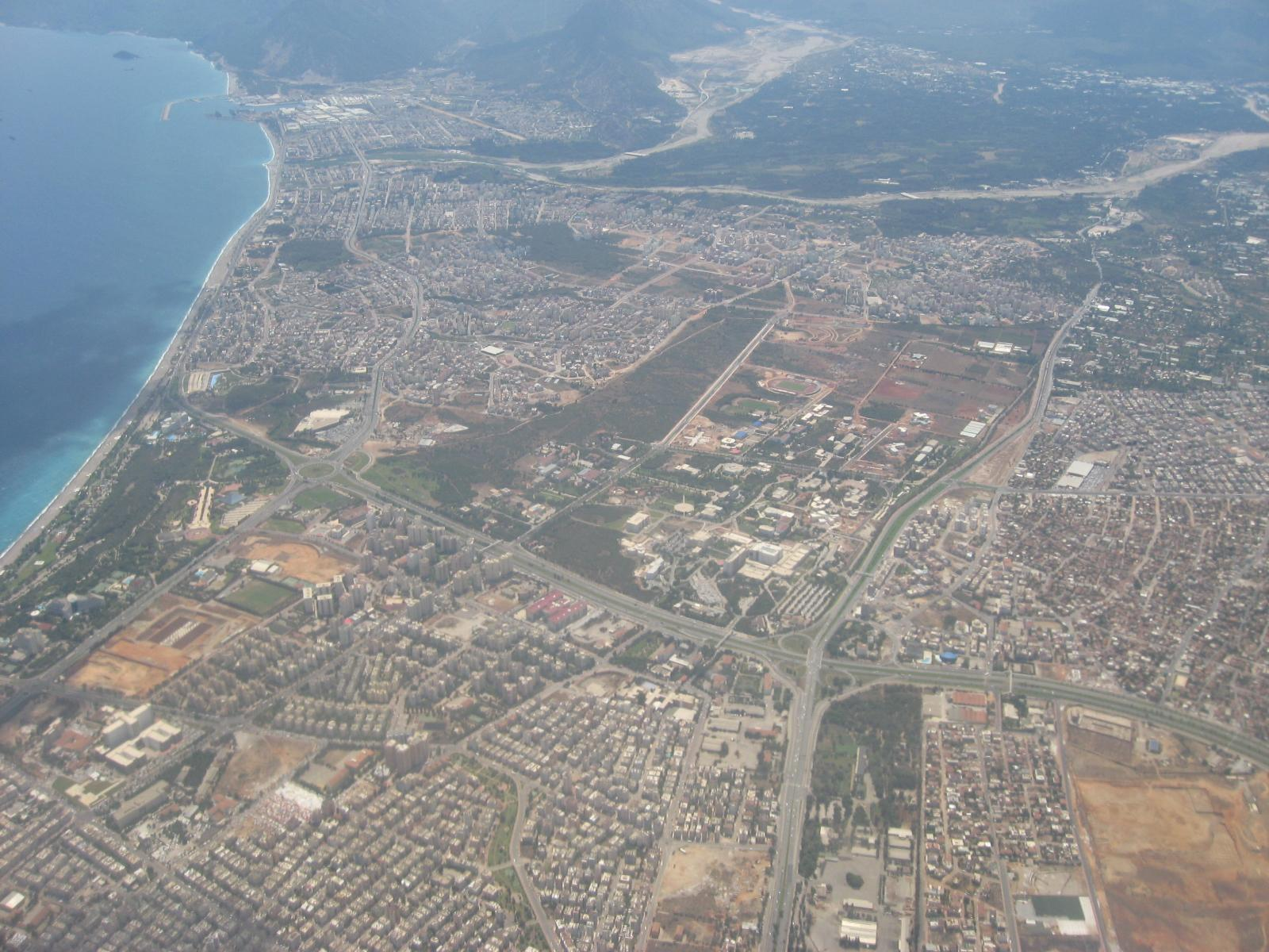 Анталија поглед из авиона Сопствена слика Драган Цветковић Ниш